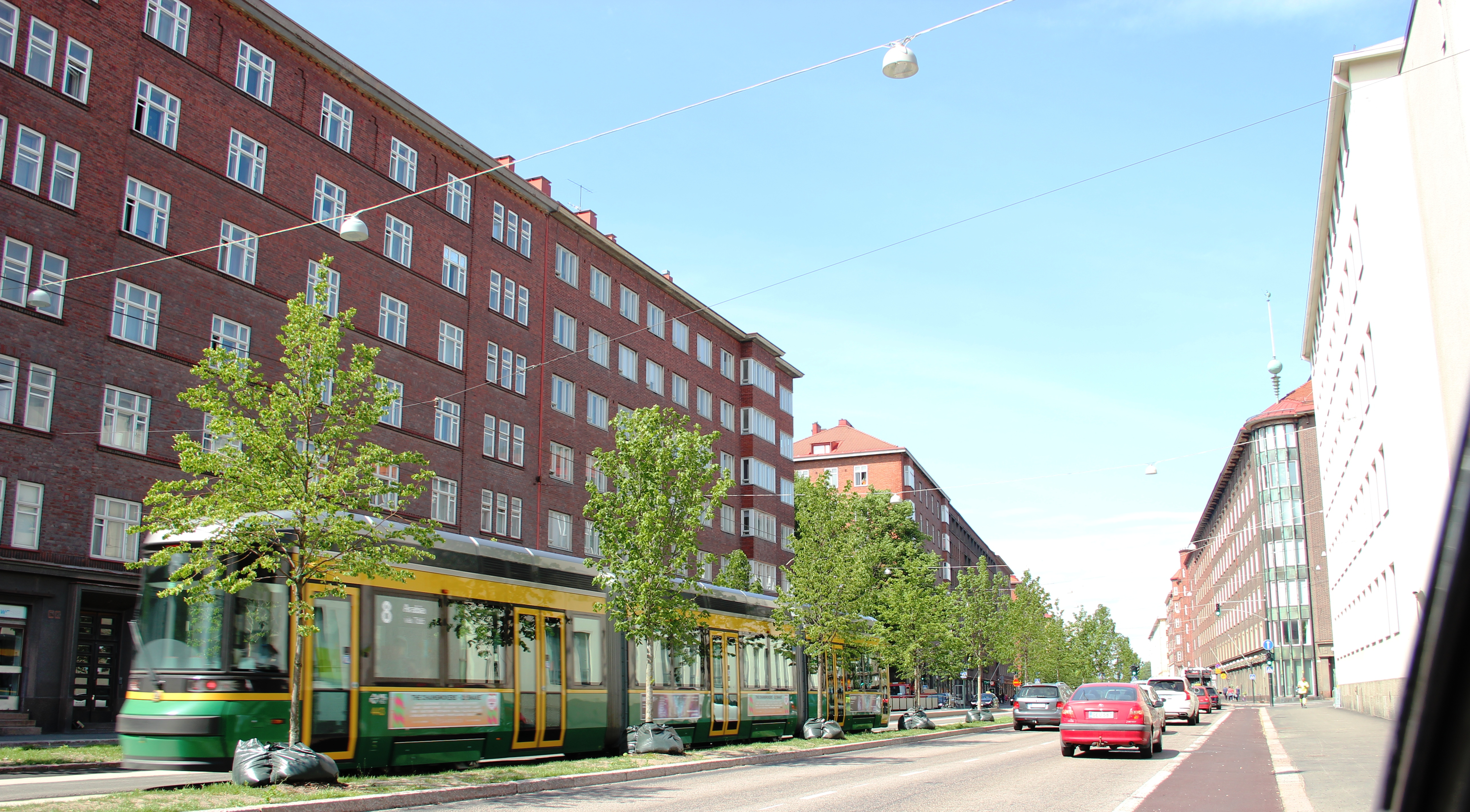 Kaadettujen tilalle istutetut lehmukset, Mechelininkatu, Etu-Töölö, Helsinki